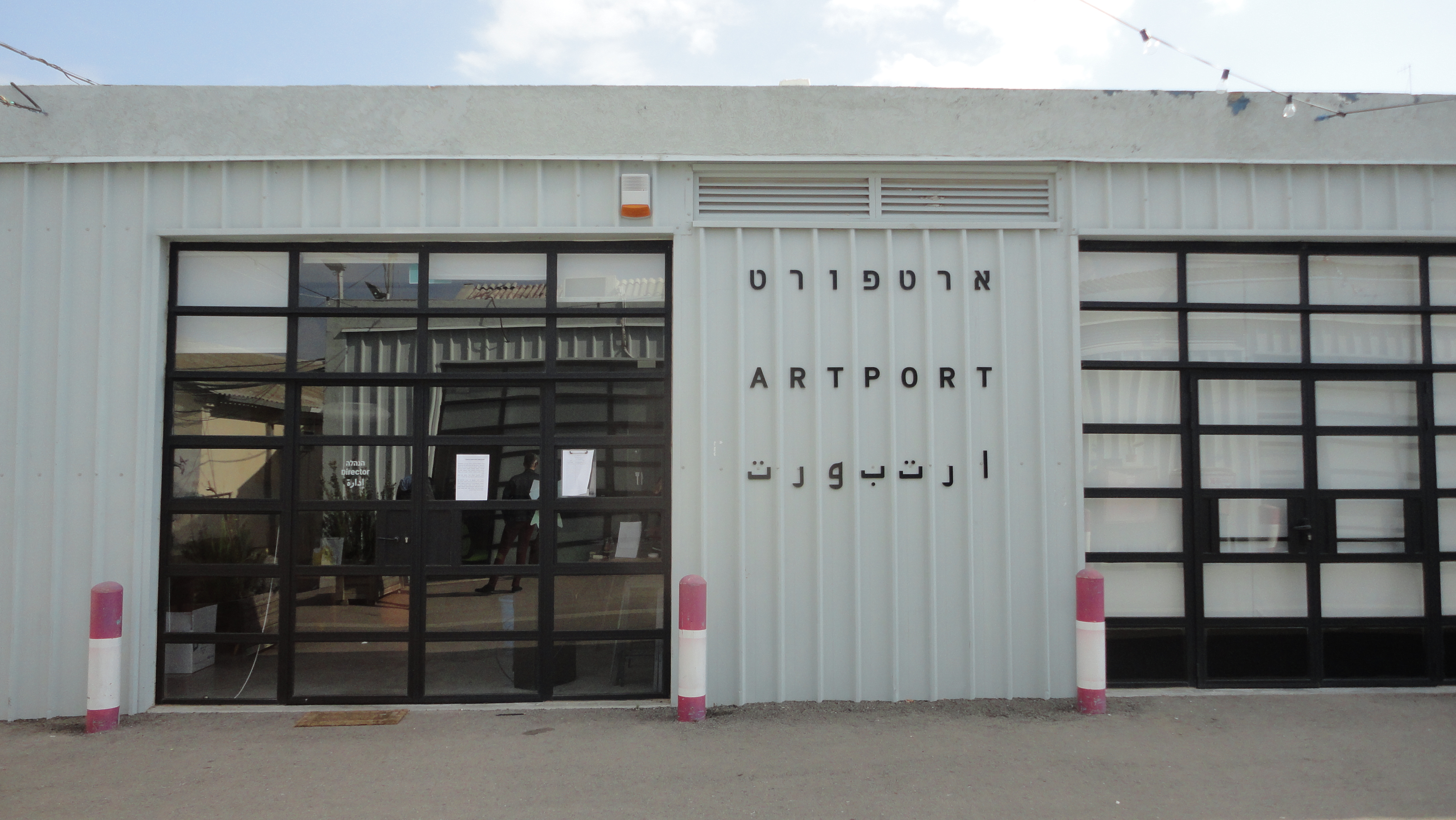 מתחם ארטפורט, דרך בן צבי, תל אביב-יפו